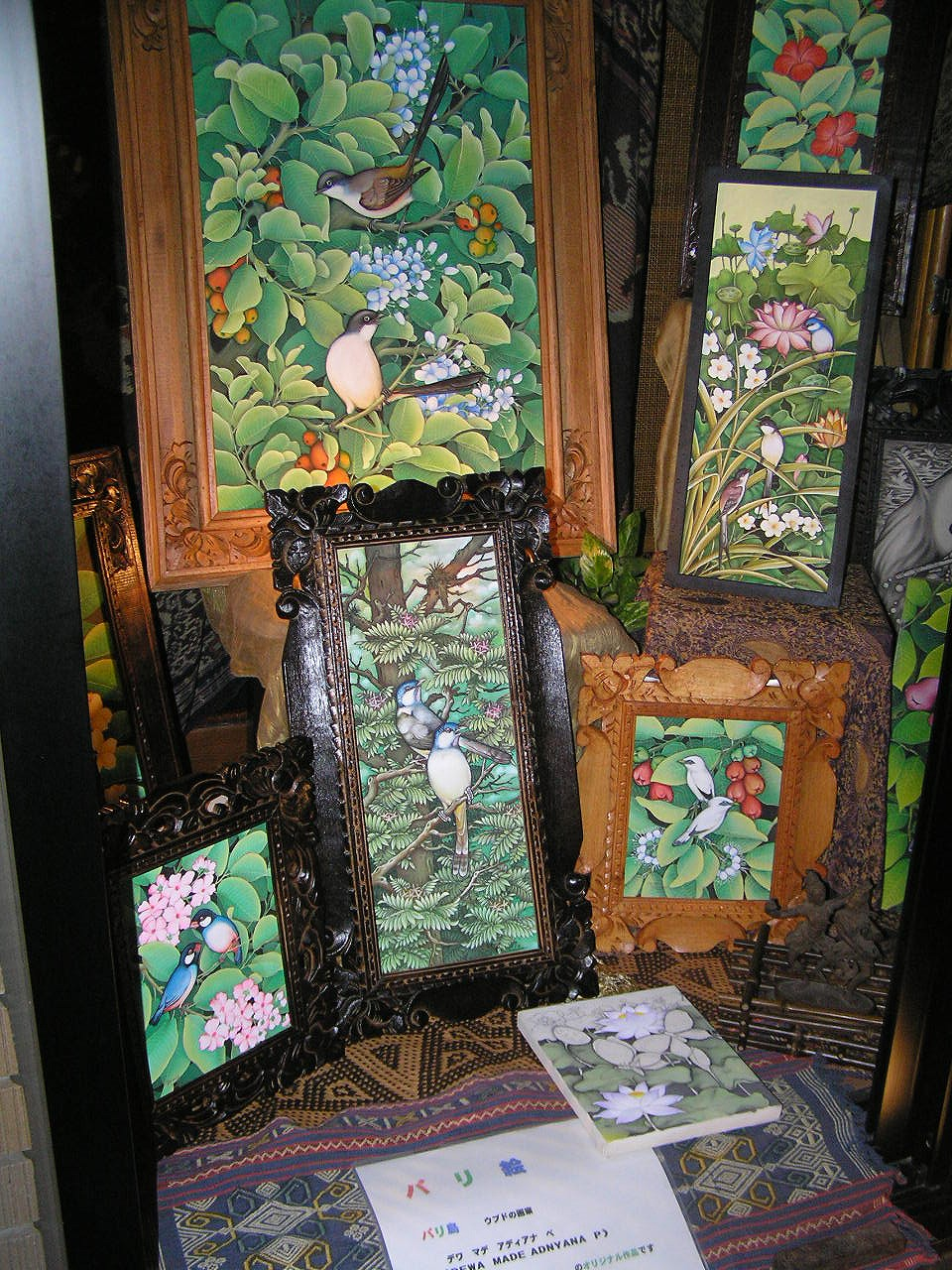 BALI バリ絵画